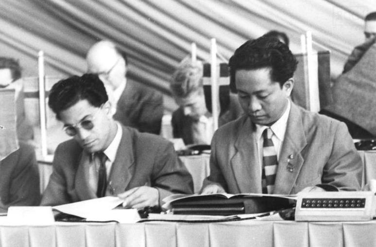 Zentralbild Heilig 11.7.1958. V. Parteitag der SED vom 10. bis 16.7.1958 in der Werner-Seelenbinder-Halle, Berlin, 2. Tag. UBz: Die Mitglieder der indonesischen Delegation (rechts) D. N. Aidit, Generalsekretär der KP Indonesiens, und (links) Revang, 1. Sekretär der KP Javas.